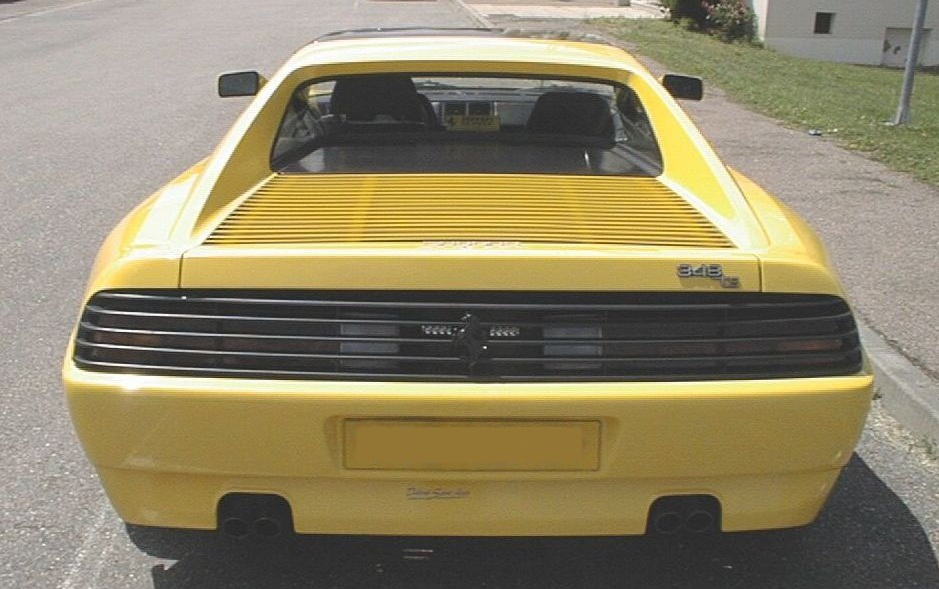 Ferrari 348 TS.